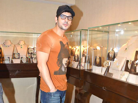 Zayed Khan